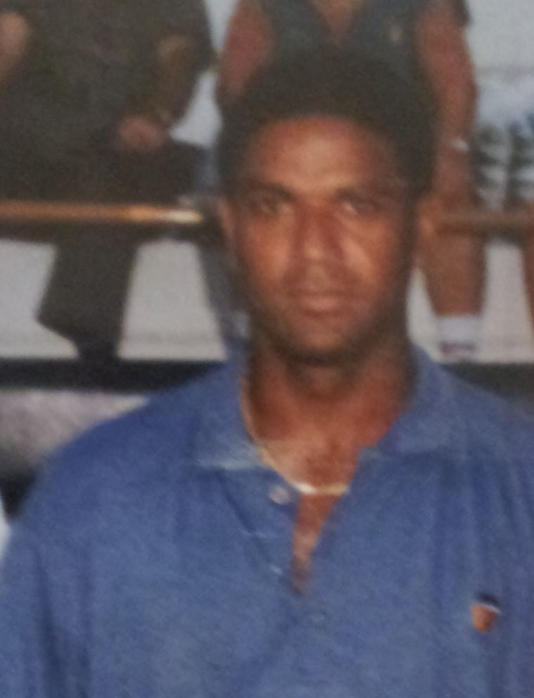 Mazinho (Iomar do Nascimento) com a jugador del València CF